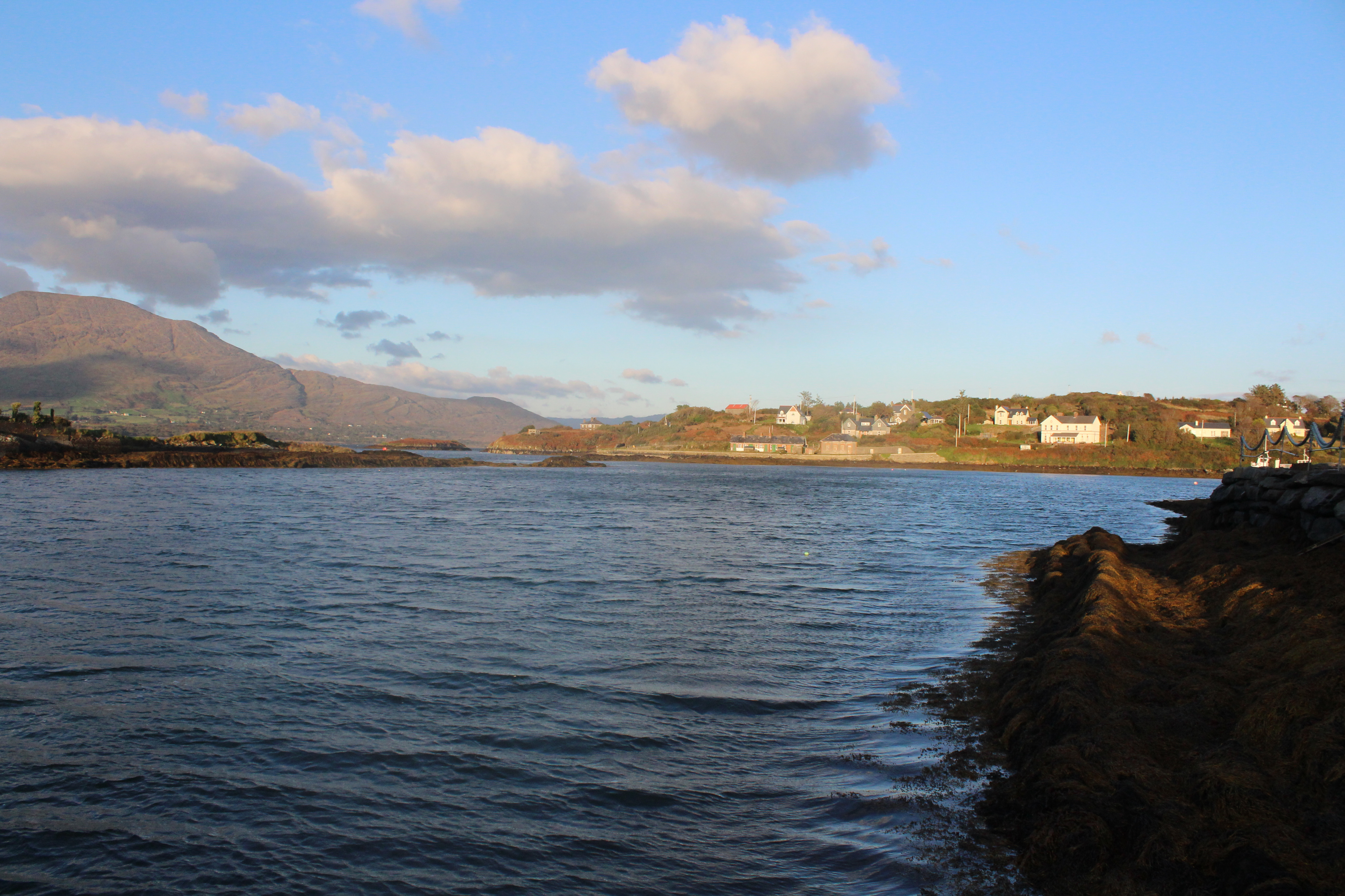 Haven van Bere eiland